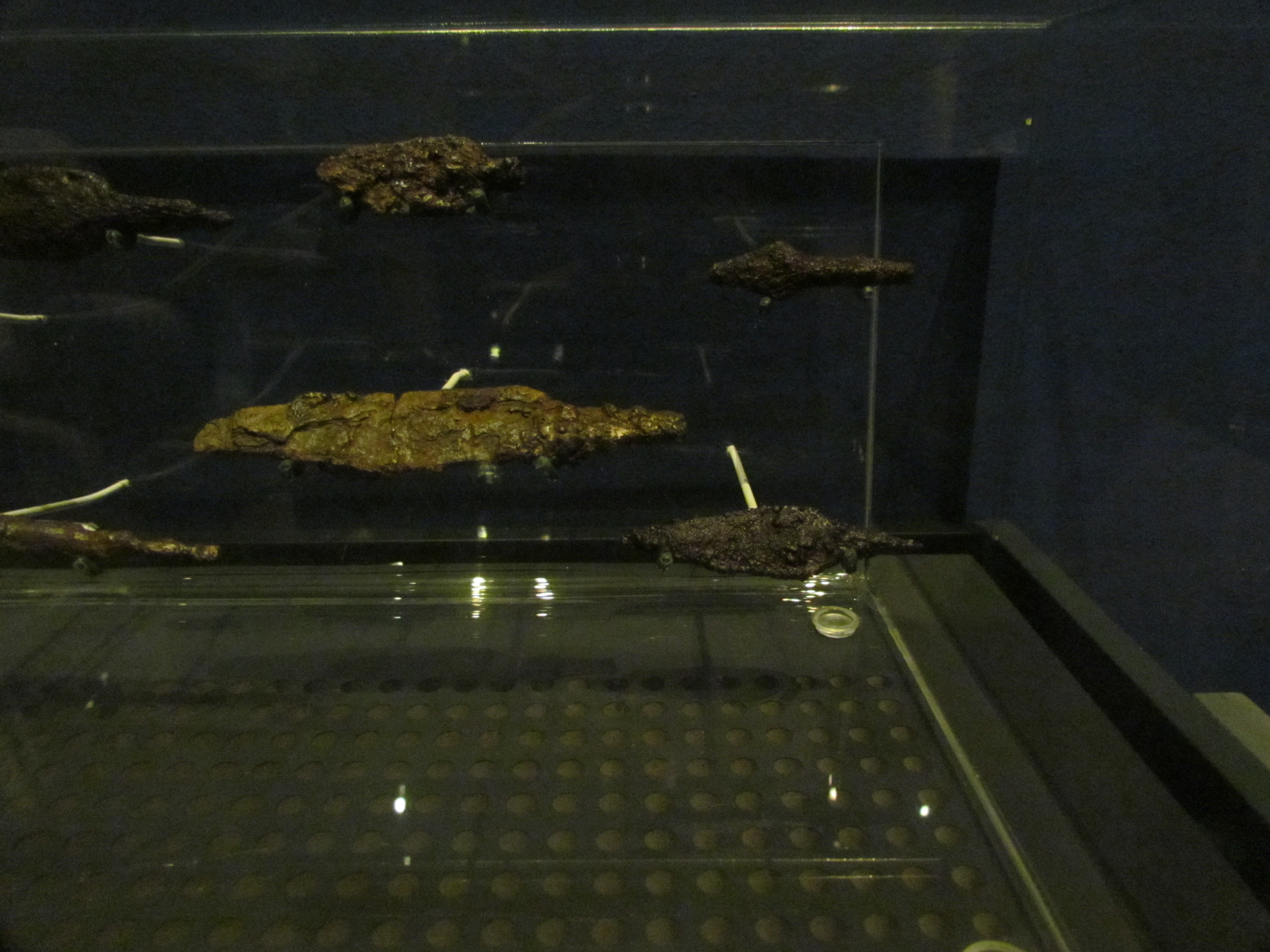 ראשי חיצים עשויים סגסוגת נחושת וברזל ששימשו בקרבות על יהודה וירושלים בראשית המאה השישית לפנה"ס. מוזיאון ארצות המקרא, ירושלים.